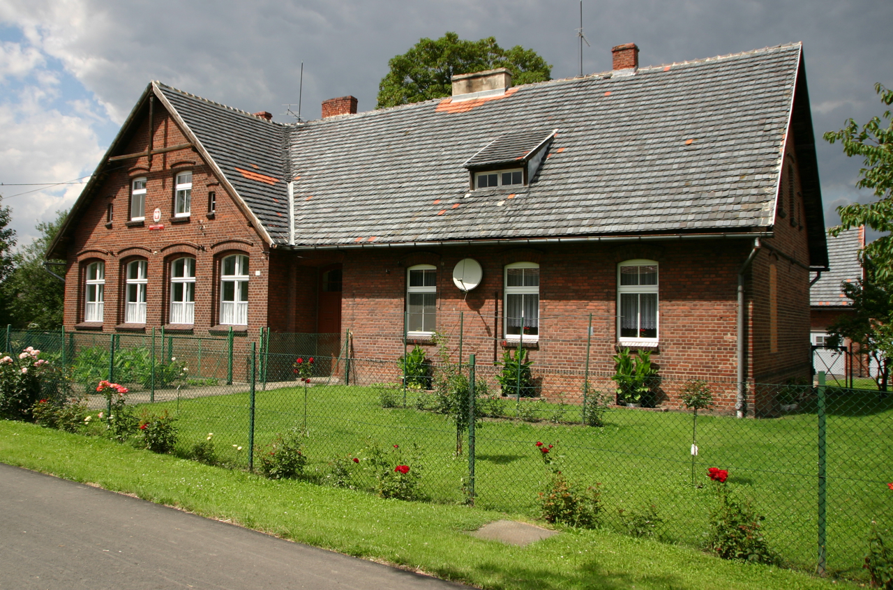 Otoki (dodatkowa nazwa w j. niem. Ottok) – wieś w Polsce położona w województwie opolskim, w powiecie prudnickim, w gminie Biała.